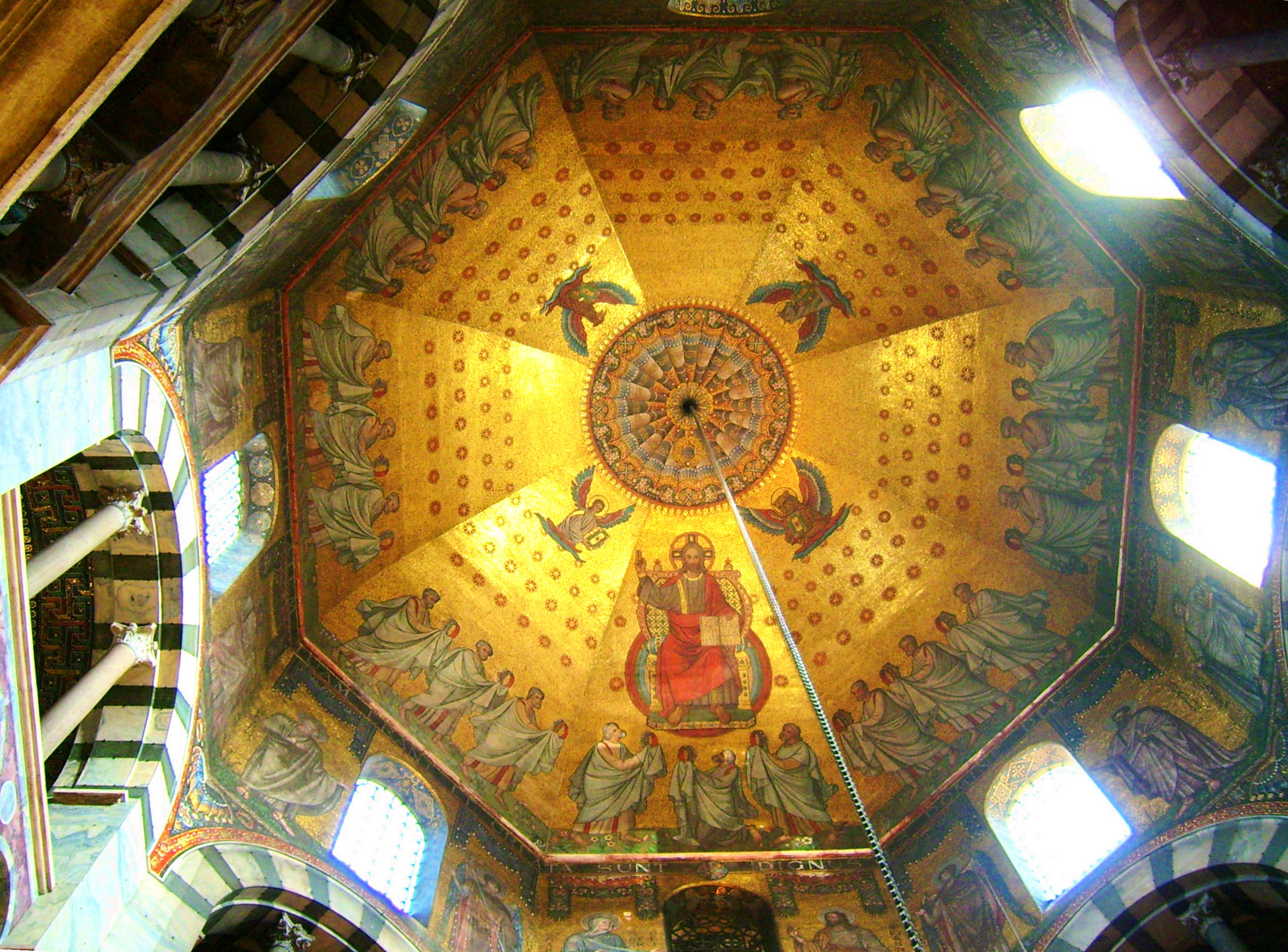 Decke im Aachener Dom